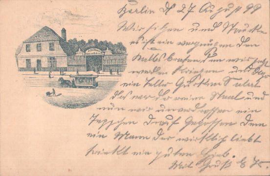 Ansichtskarte vom Restaurant Kuhstall, Invalidenstr. Berlin